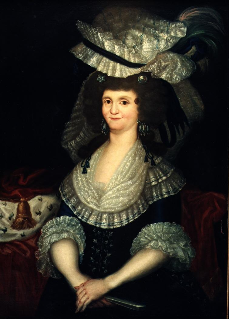 Retrato de la reina María Luisa de Parma (1751-1819), que fue la única esposa del rey Carlos IV de España y la madre de Fernando VII.